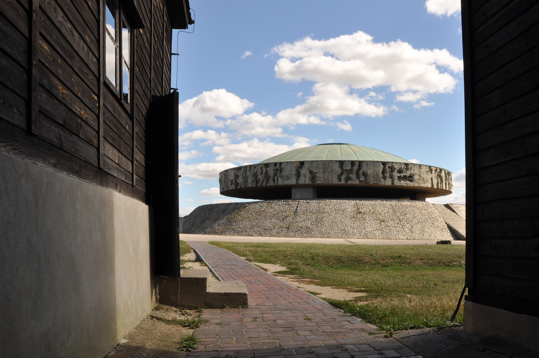 Teren byłego, niemieckiego, nazistowskiego obozu koncentracyjnego na Majdanku (Konzentrationslager Lublin) Widok Mauzoleum od strony krematorium (widok od strony zachodniej).